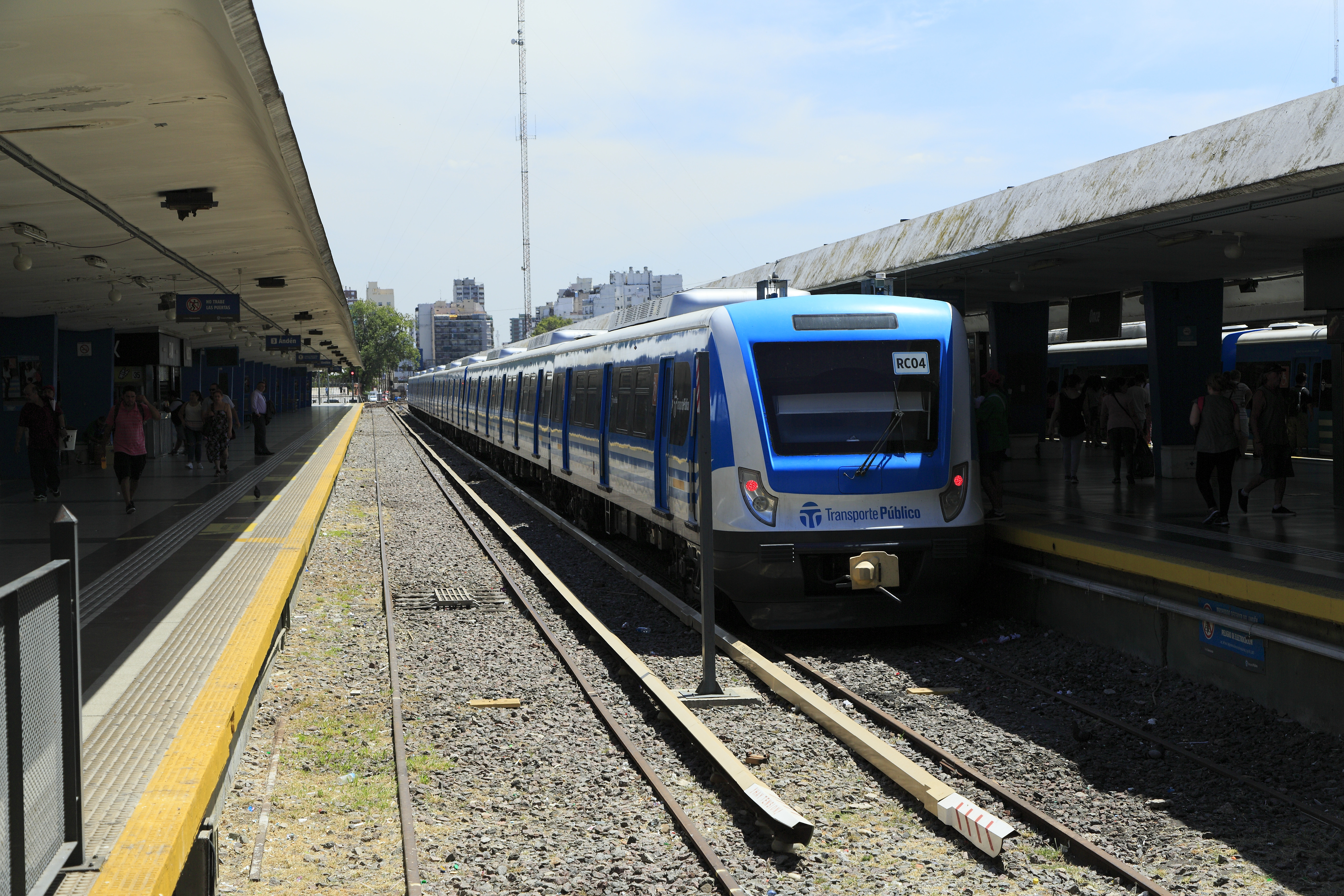 Eine der erst 2014 und 2015 gelieferten S-Bahn-Einheiten. Die »Linea Sarmiento« wird bis Moreno als einzige mit Neunwagenzügen und noch dazu an Arbeitstagen nahezu durchgängig im Zehnminutentakt bedient, damit dürfte sie am stärksten genutzte Strecke im S-Bahn-Netz sein.Die Zugsignale sind umgeschaltet, der Zug ist abfahrbereit. Die Zugzielanzeigen sind auch hier nur schwer erkennbar.